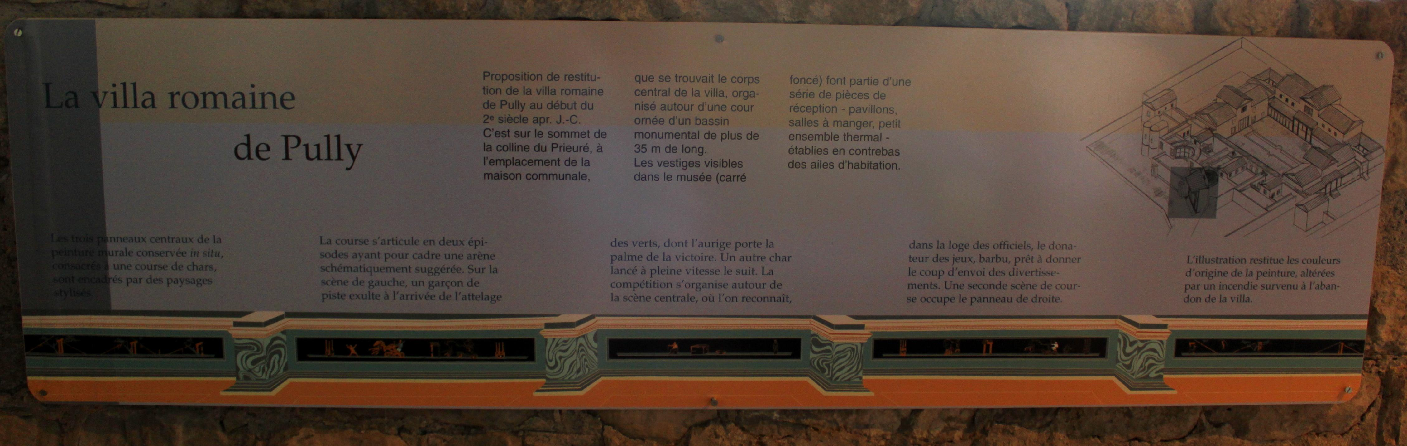 Suisse, canton de Vaud, villa romaine du Prieuré, peintures murales, informations.